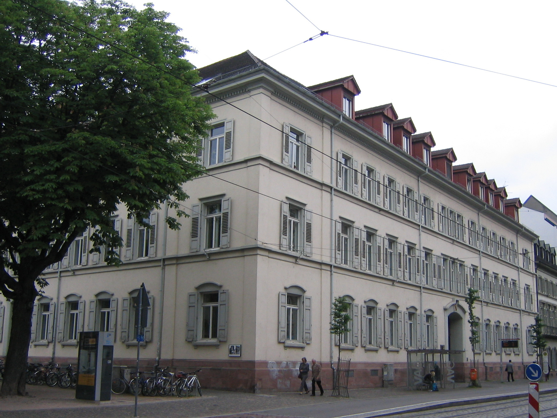 Geburtshaus von Adolf Furtwängler kurz hinter dem Martinstor in Freiburg